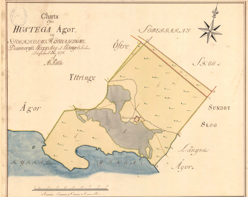 Ägomätning för Hustega gård på Lidingö upprättad av lantmätare Sjölin 1776. Dåvarande ägaren till Hustega gård uppgavs som borgaren i Vaxholm, Anders Welandt.